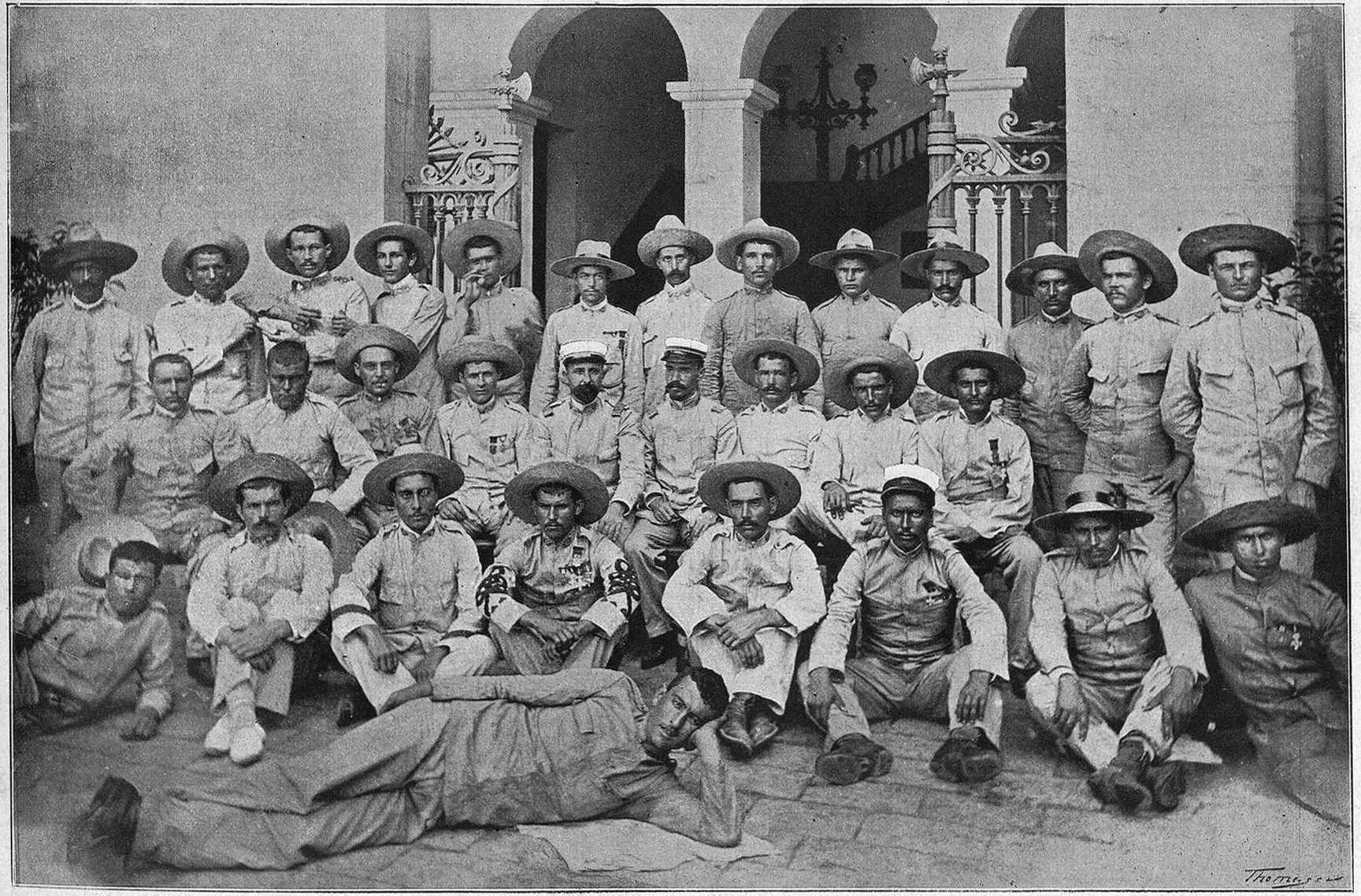 Los supervivientes del destacamento de Baler fotografiados el 2 de septiembre de 1899 en el patio del cuartel Jaime I de Barcelona (actualmente uno de los campus de la Universidad Pompeu Fabra) a su llegada a la península.Fotografía aparecida en el artículo "El destacamento de Baler", publicado en La Ilustración Artística de Barcelona el 11 de septiembre de 1899. El pie de foto dice: Los defensores de Baler en Barcelona (de fotografía, de Laureano).